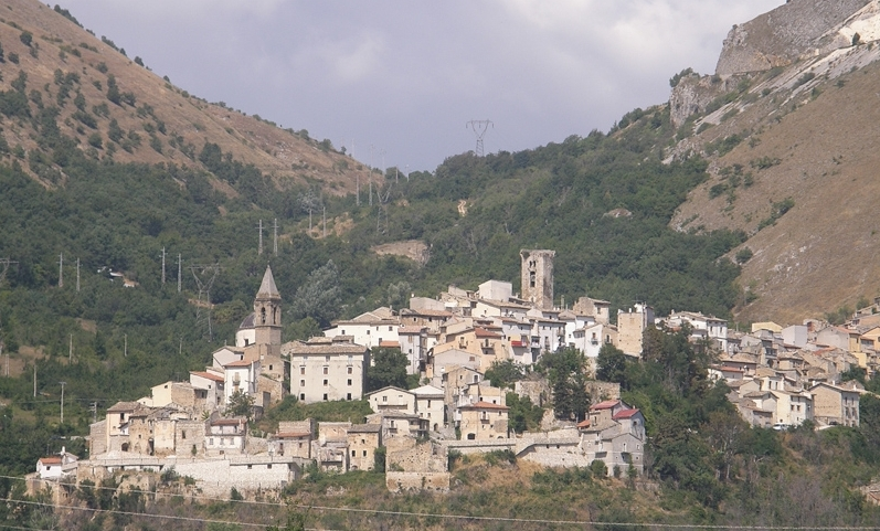 Cocullo 2009